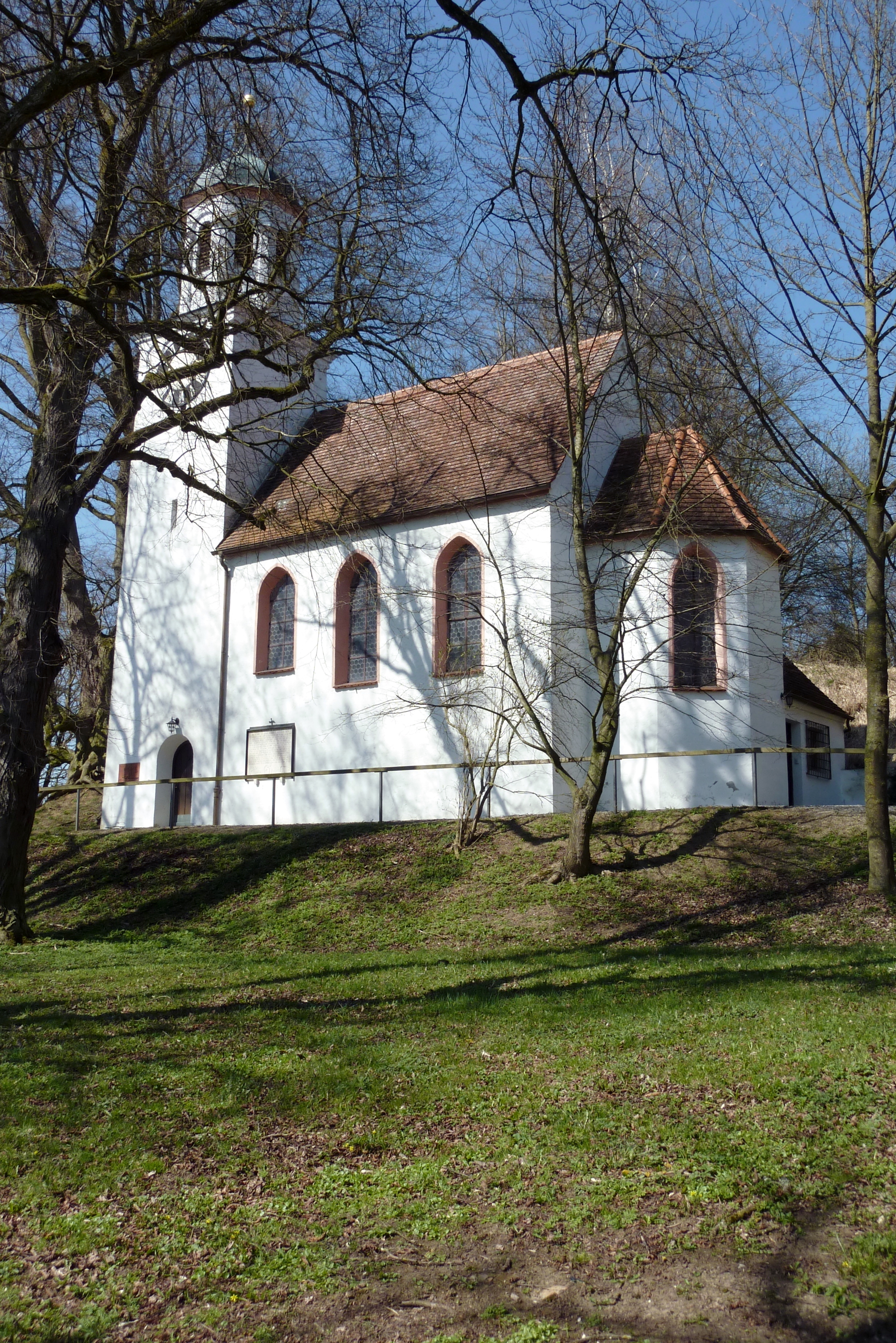 Schlosskapelle St. Georg in Hohenreichen, einem Ortsteil von Wertingen